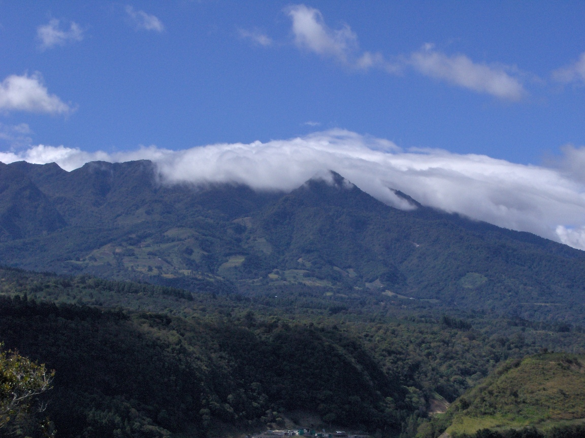 Volcan Baru, vista desde Boquete